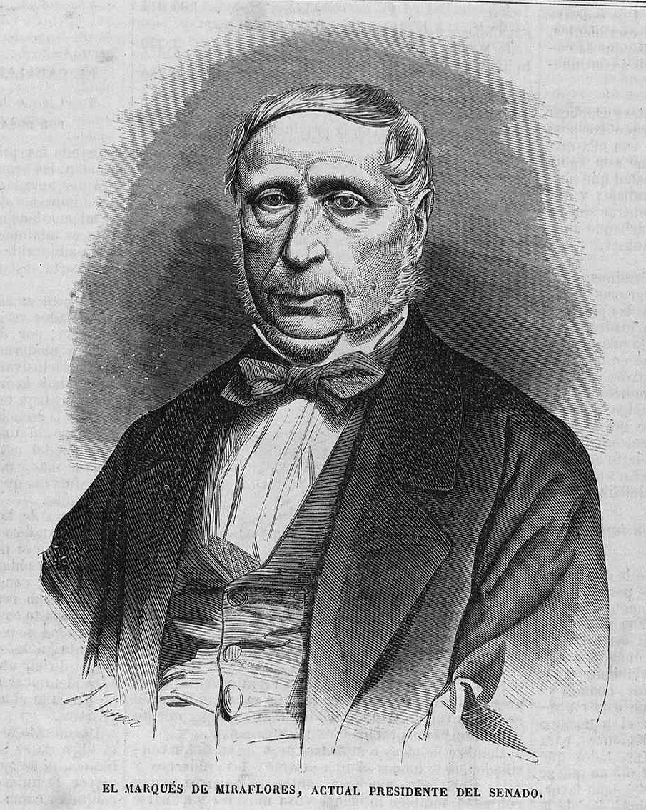 El marqués de Miraflores, en la revista española El Museo Universal.